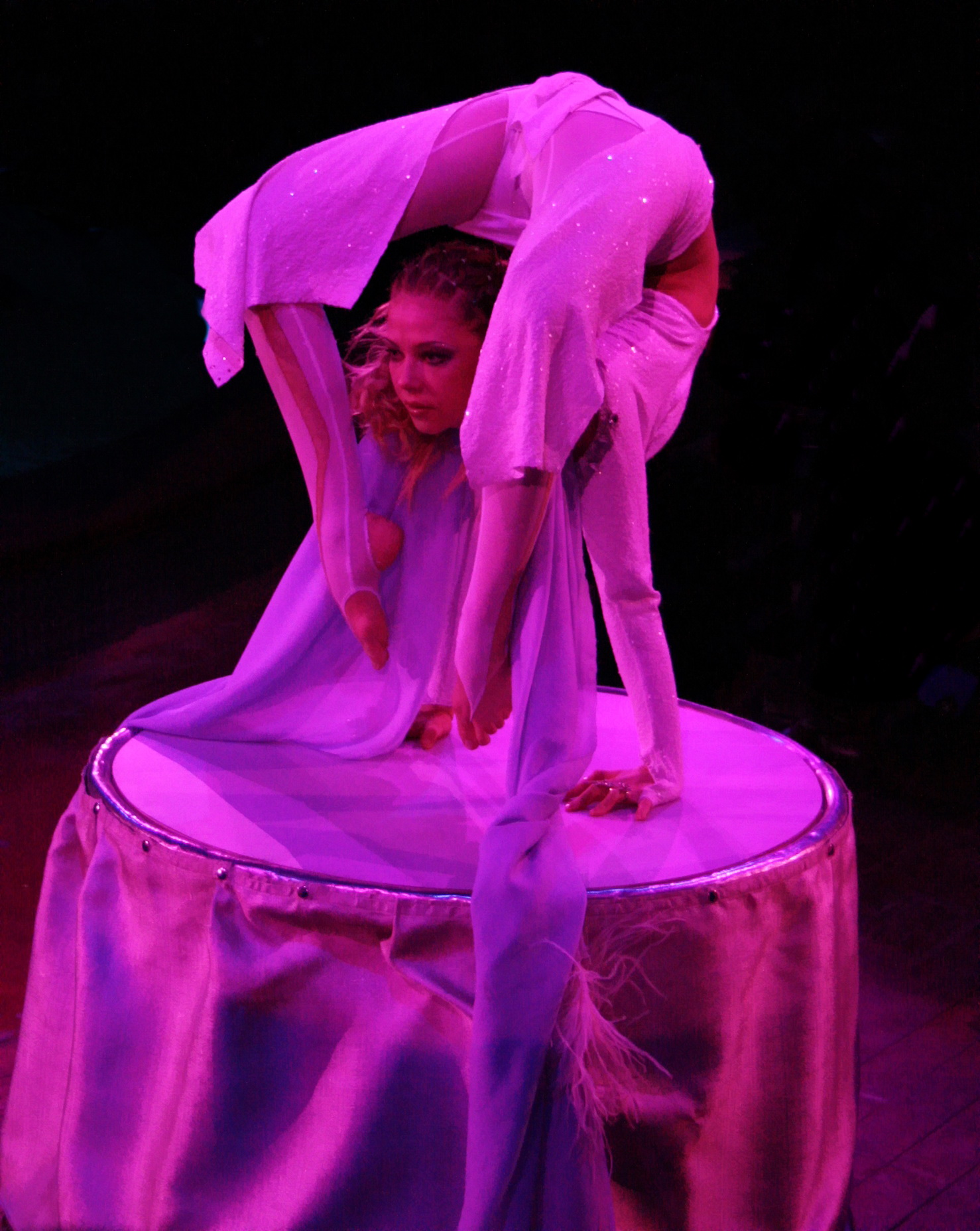 MARIA EFREMKINA die Schlangenfrau in einer Zirkusvorstellung